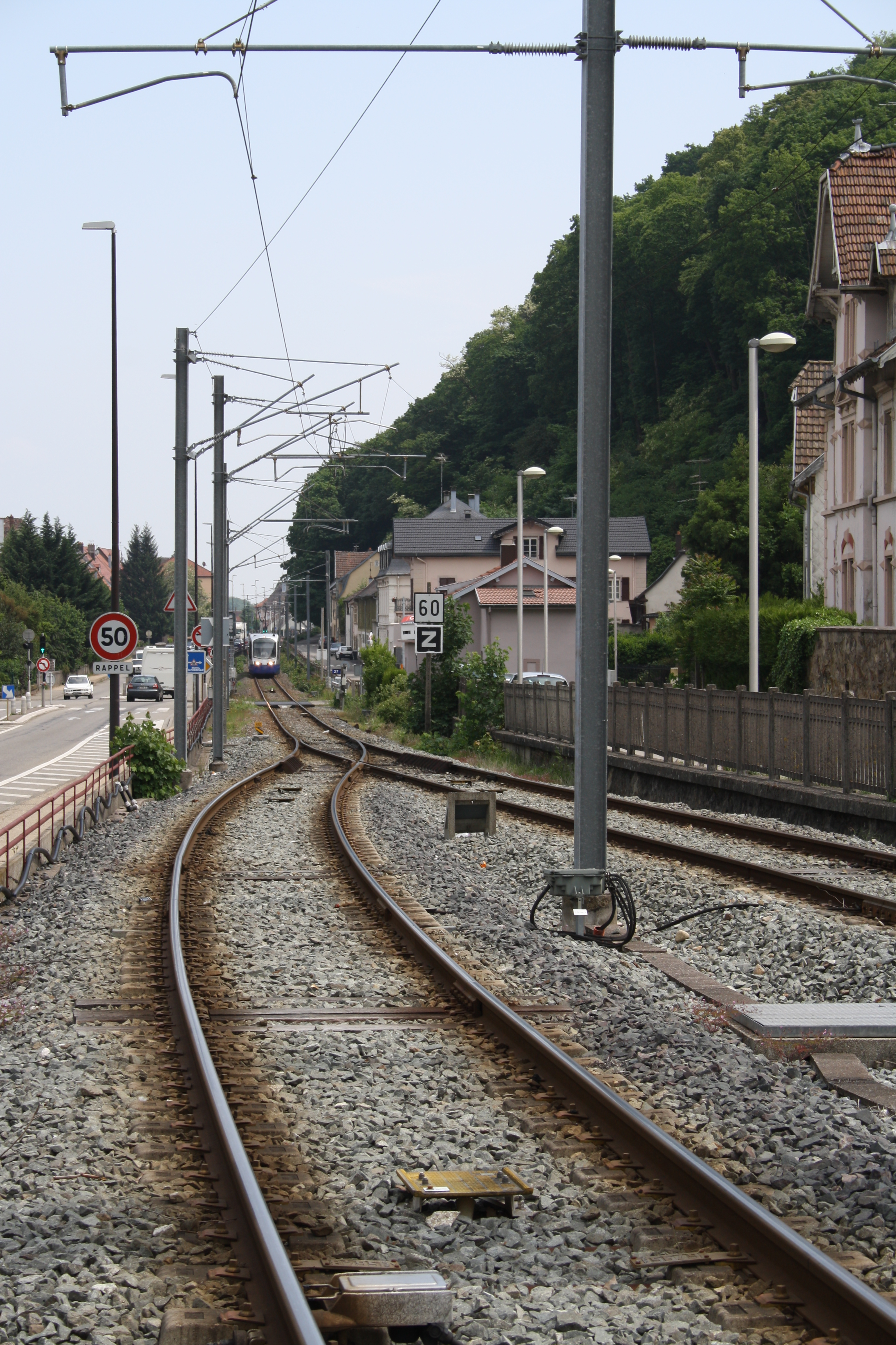 Bahnstrecke Lutterbach – Kruth in Thann